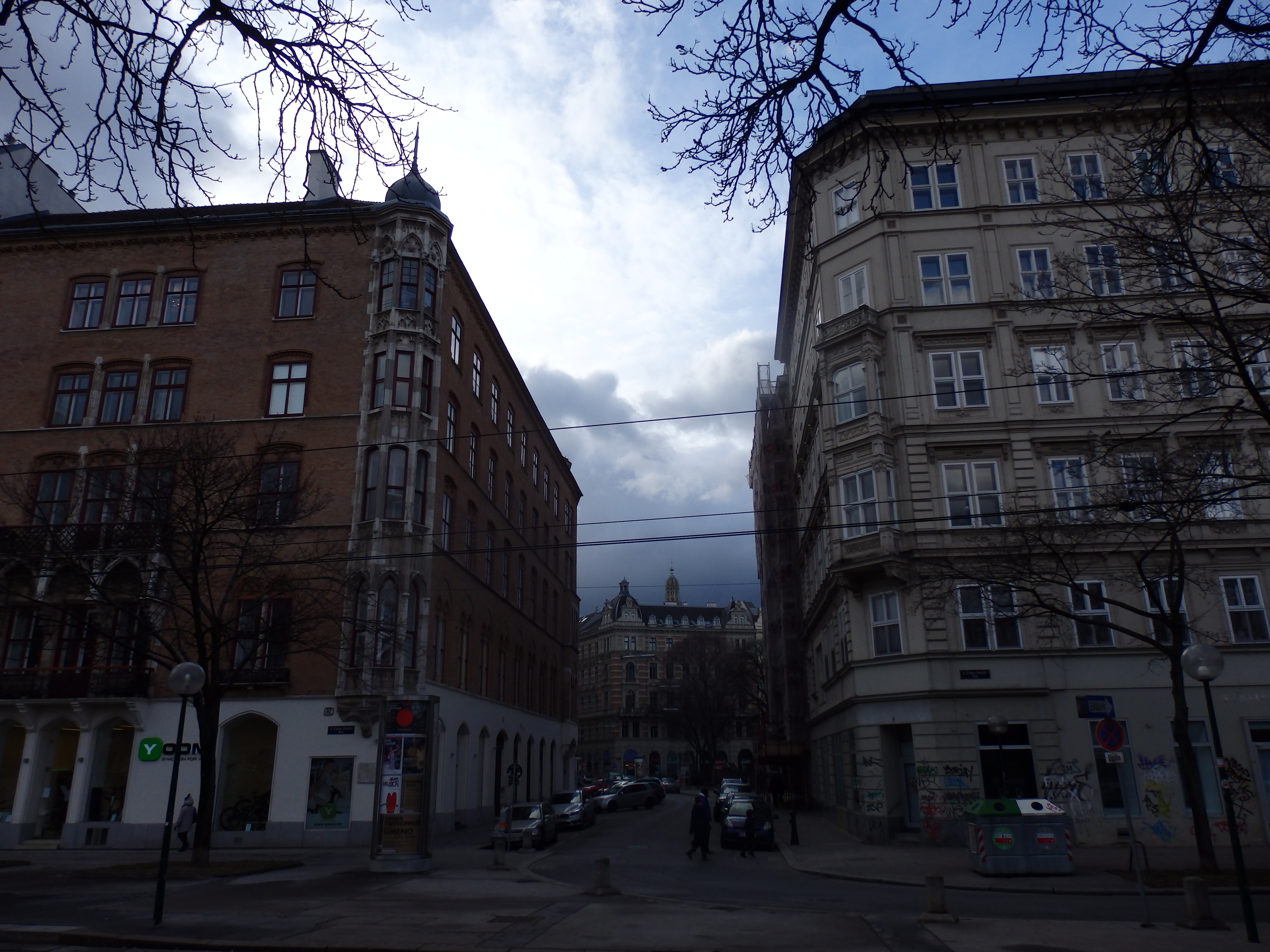 Gölsdorfgasse vom Franz-Josefs-Kai nach Süden, Wien-Innere Stadt